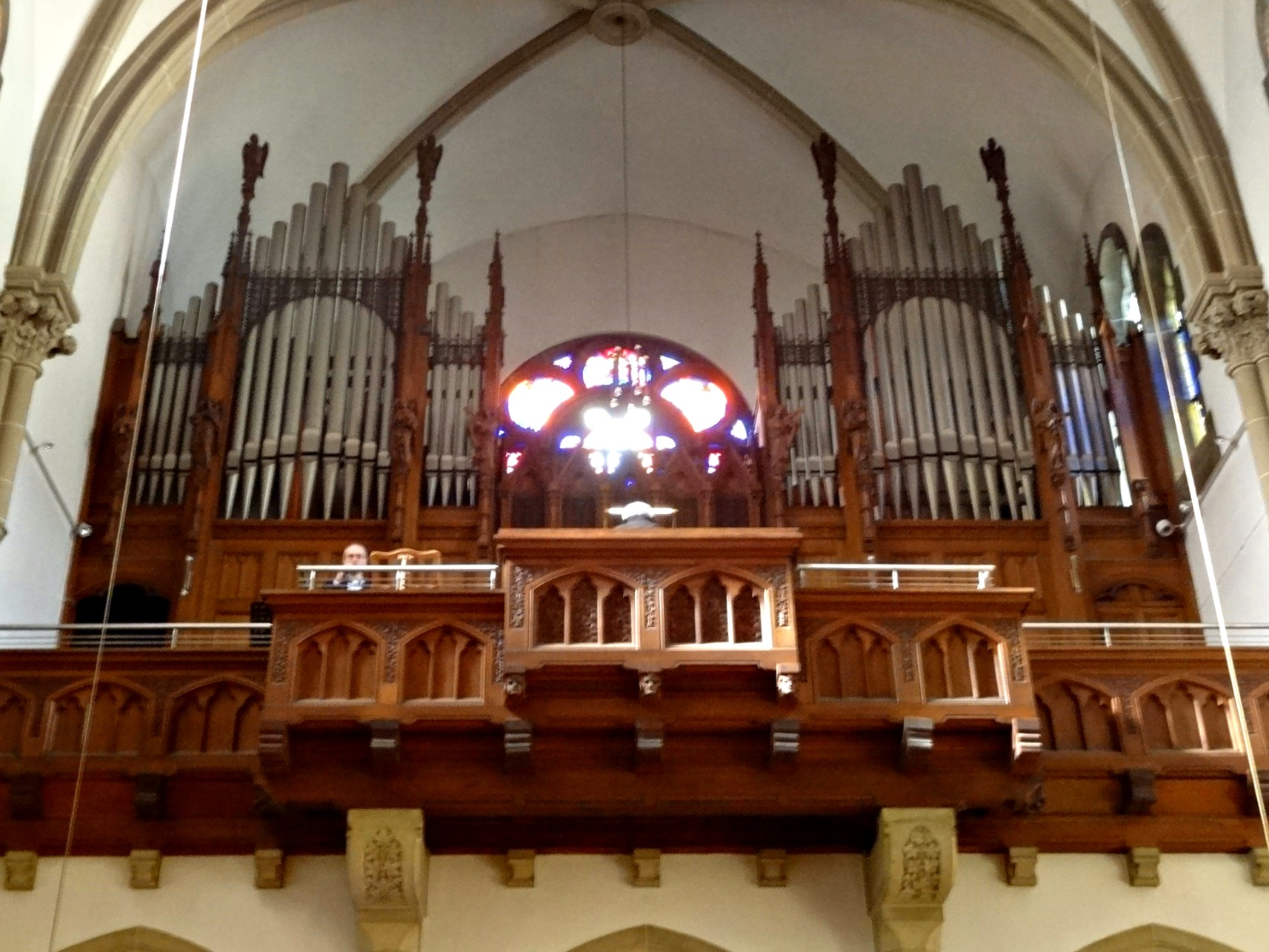 Herz-Jesu-Kirche, Dresden